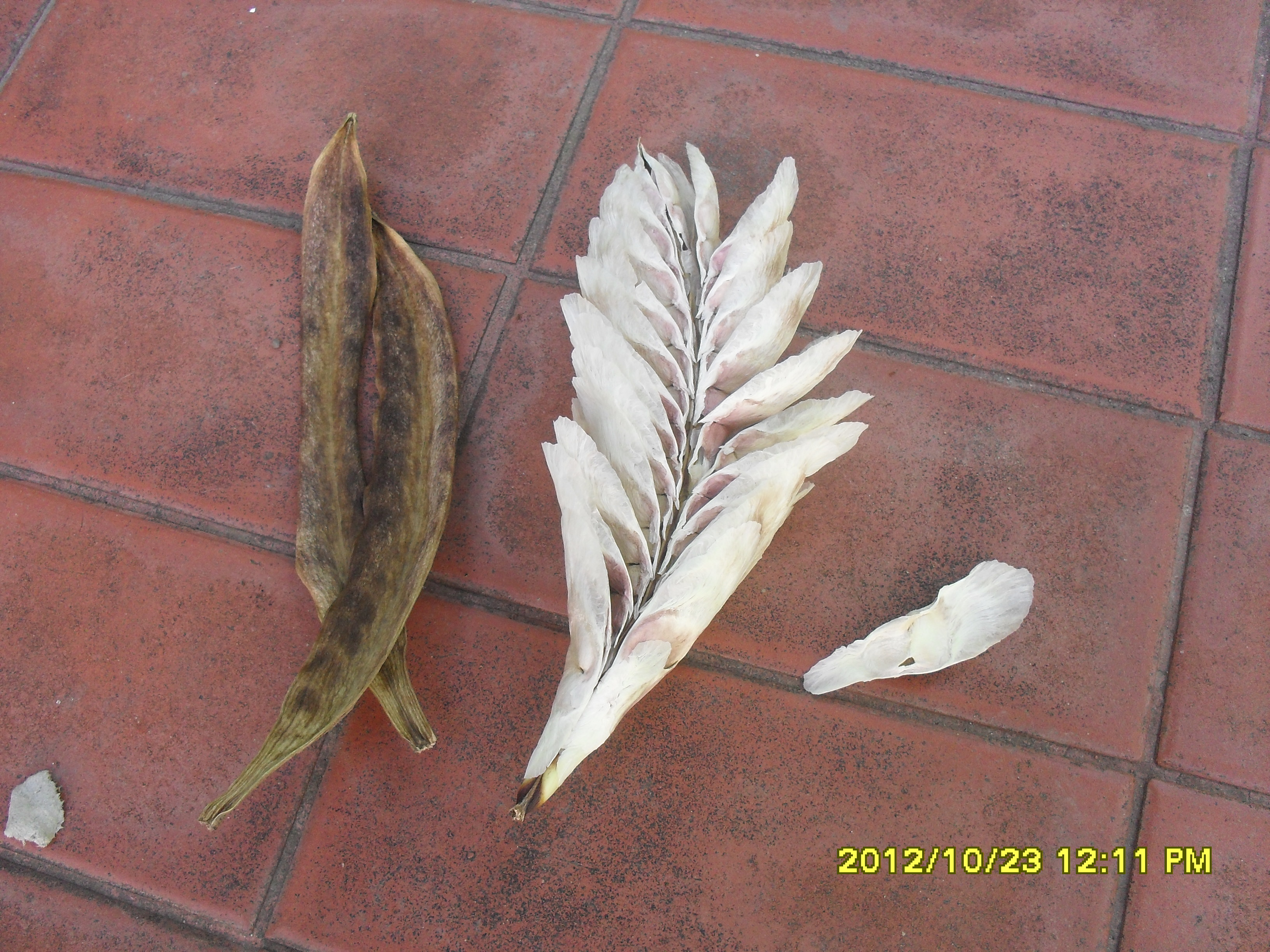 cápsula vacia y semillas aladas de T. aurea